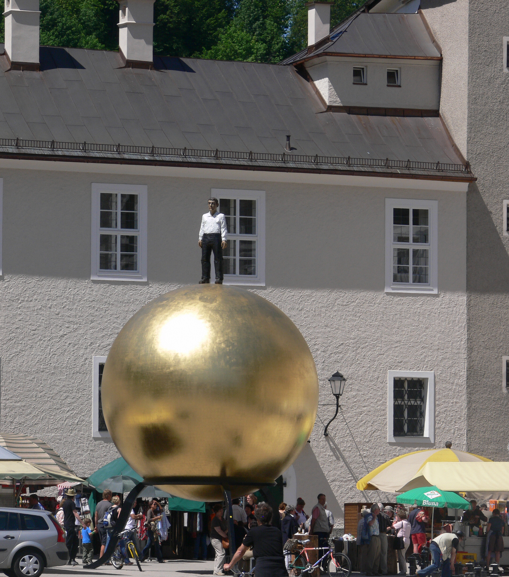 Kapitelplatz Salzburg mit Skulptur "Sphaera" von Stephan Balkenhol, aufgestellt im Rahmen des "Kunstprojekts Salzburg 2007" der Salzburger Festspiele